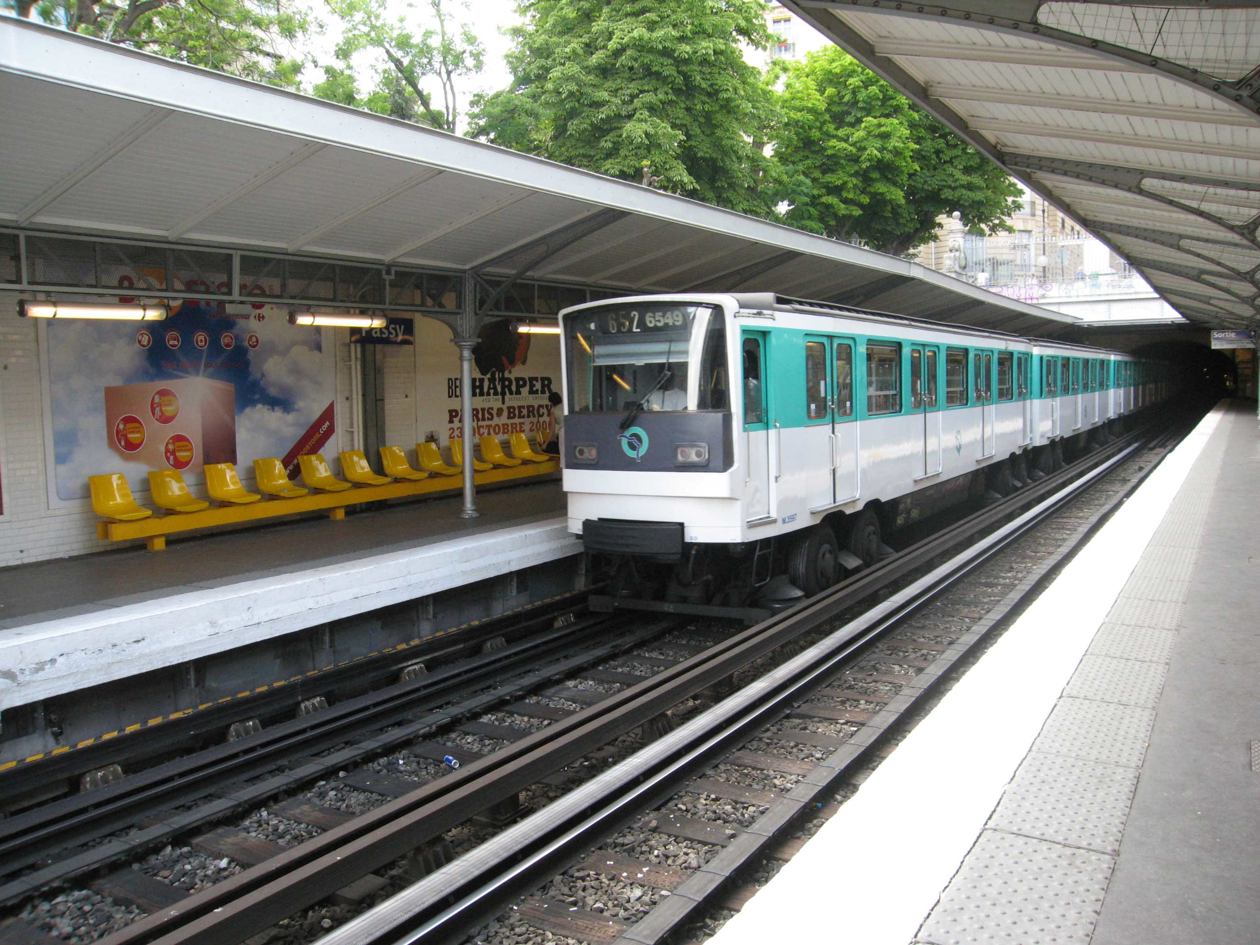 Metro de Paris Rame de la serie MP73 sur la ligne 6 a la station Passy Lieu : Paris, France Date : Juin 2006 Auteur : Pline photo personnelle